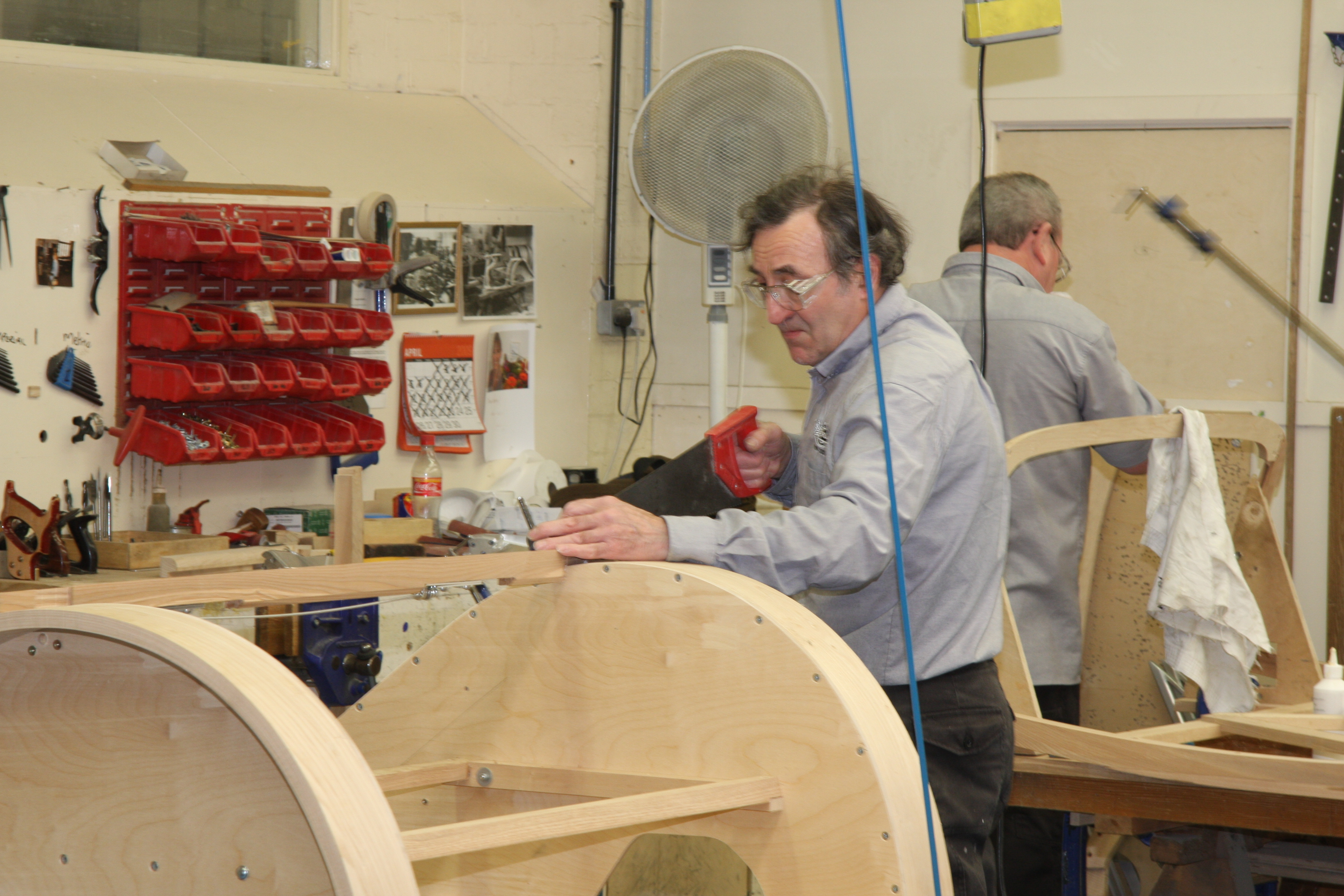 Morgan woodworking